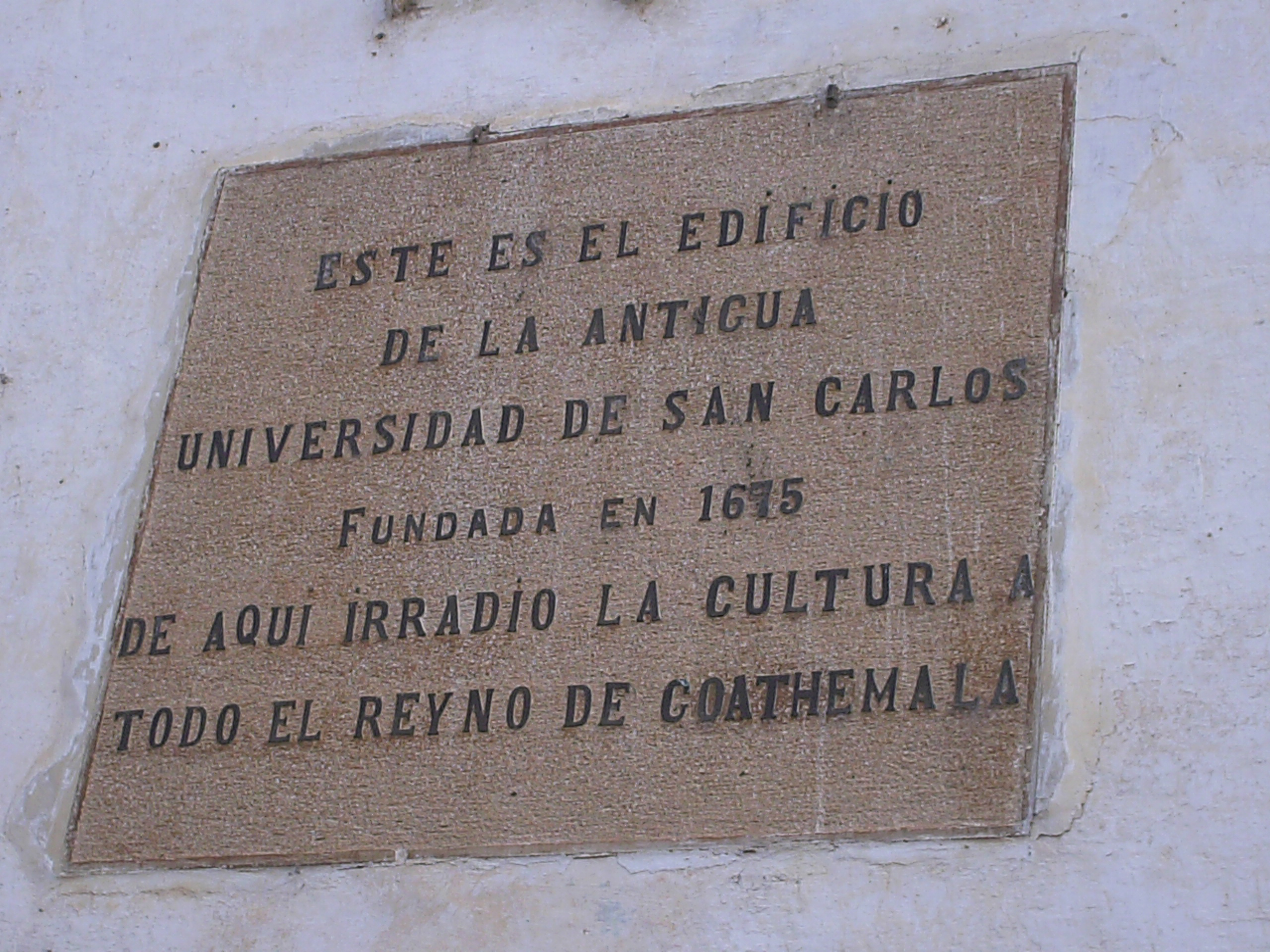 Letrero en la Primera Universidad en Guatemala, La Antigua Guatemala